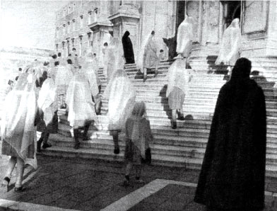 Il giorno della salute - documentario - Francesco Pasinetti 1949 - prod. Filmeuropa